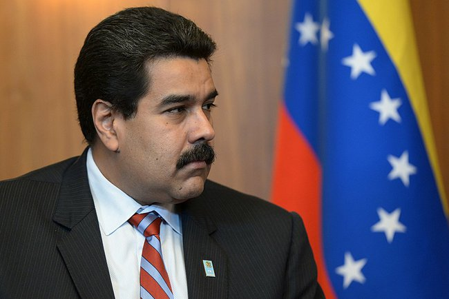 Встреча с Президентом Венесуэлы Николасом Мадуро